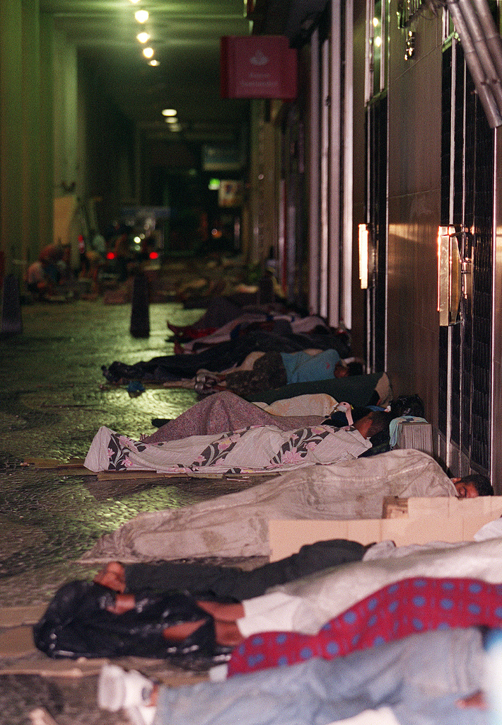 Moradores de rua. Pessoas que moram nas ruas entre a Uruguaiana e Presidente Vargas. Nesta noite foram contadas 88 pessoas buscando abrigo Foto Andréa Farias / Ag. O Dia IMAGEM DIGITAL CIDADE / RUA / MENDIGOS